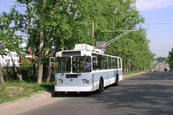 Нижегородский троллейбус ЗиУ-682 № 1641 отправляется в первый рейс после сборки.